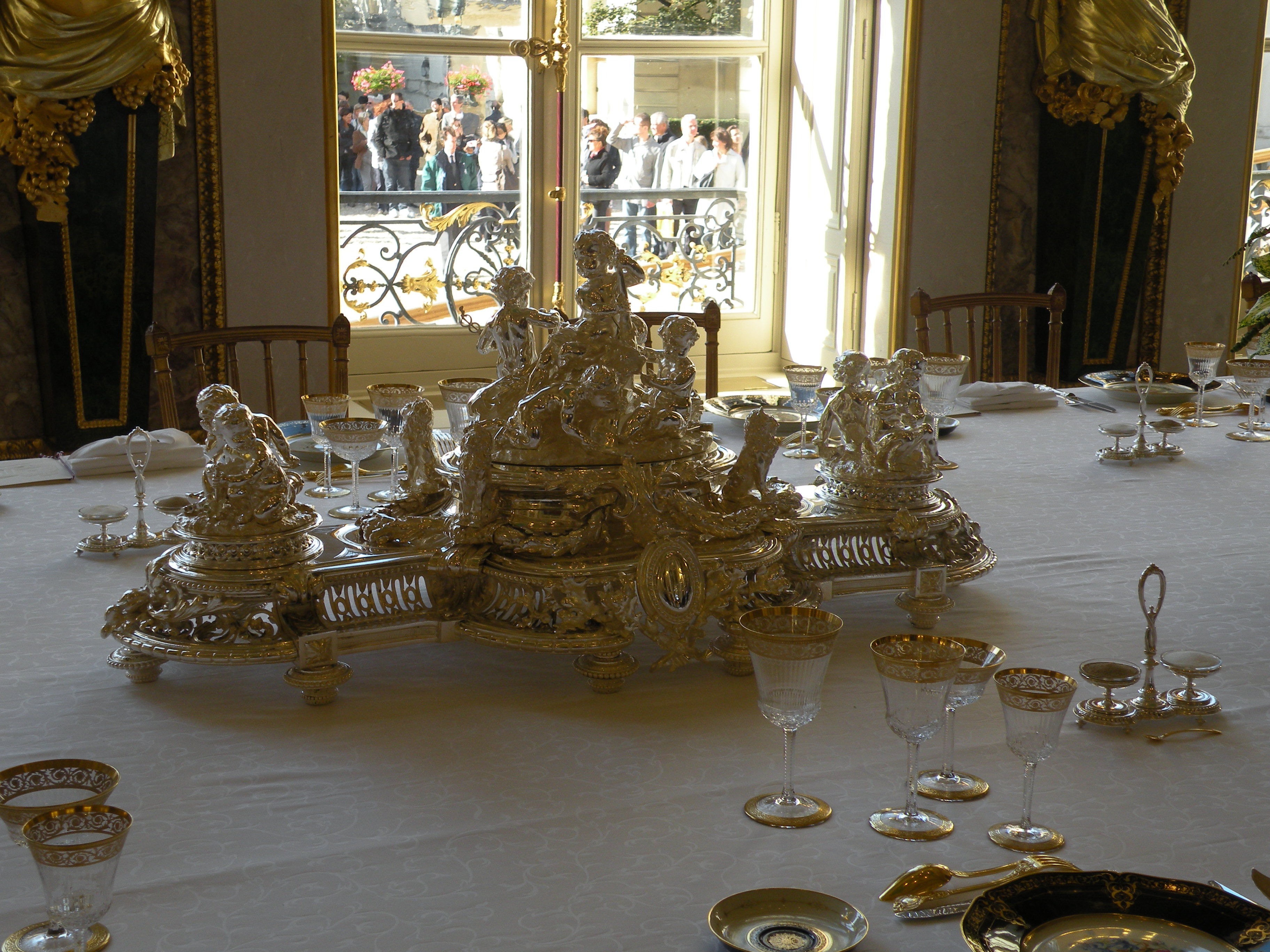 service de la salle a manger